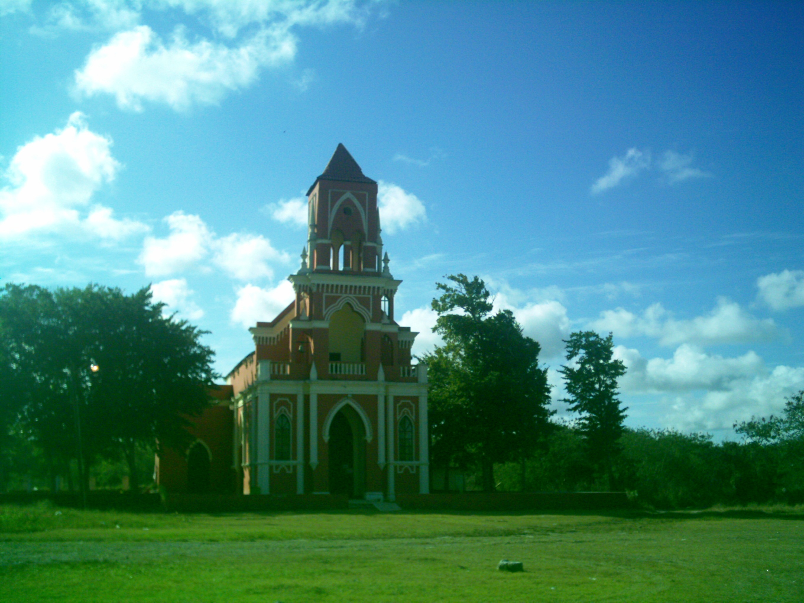 Iglesia de San Ignacio (Progreso), Yucatán.